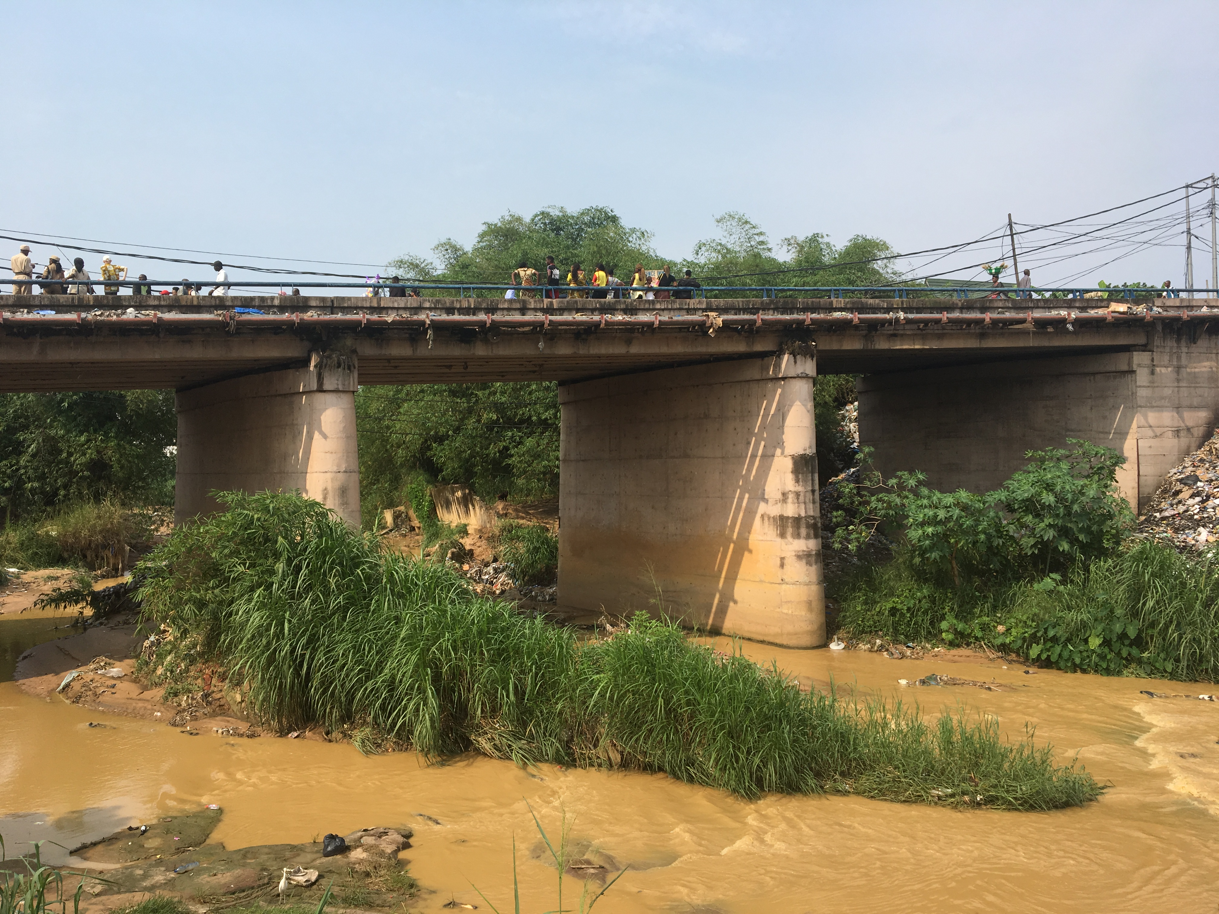 Pont de Kinsuka, 2019